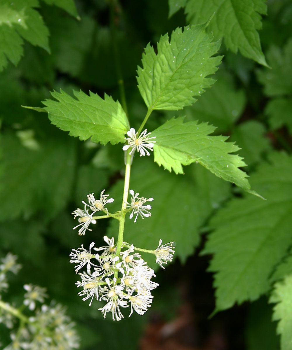 Actaea spicata, Hahnenfußgewächse (Ranunculaceae) - Türkei/Türkiye/Turkey: Prov. Bolu/Bolu ili, Bolu Dağları, ca. 2.7-2.8 km W Çeledoruğu Tepesi, Buchen-Tannenwald, ca. 1550 m